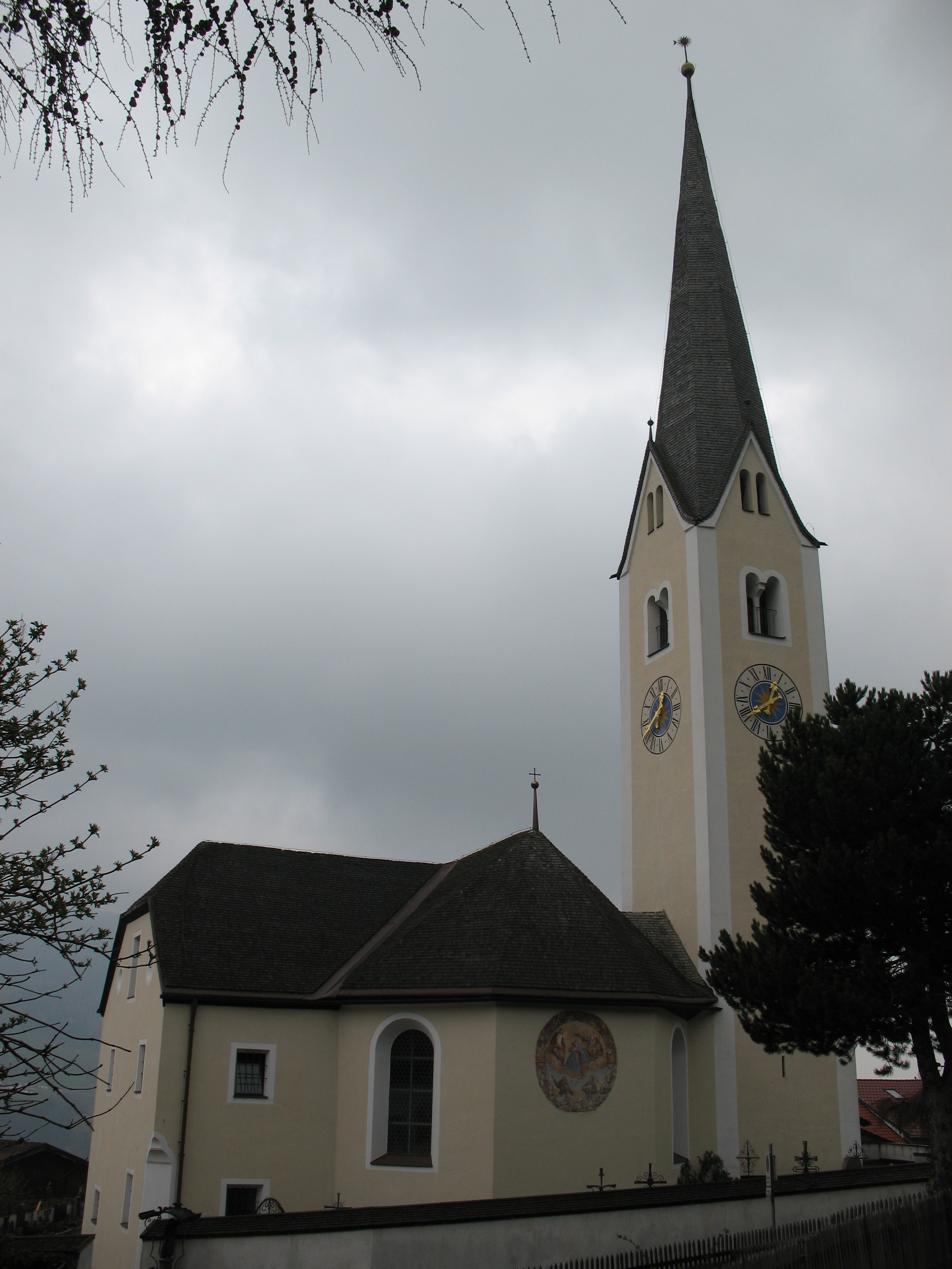 Kath. Pfarrkirche hl. Donatus und Friedhof